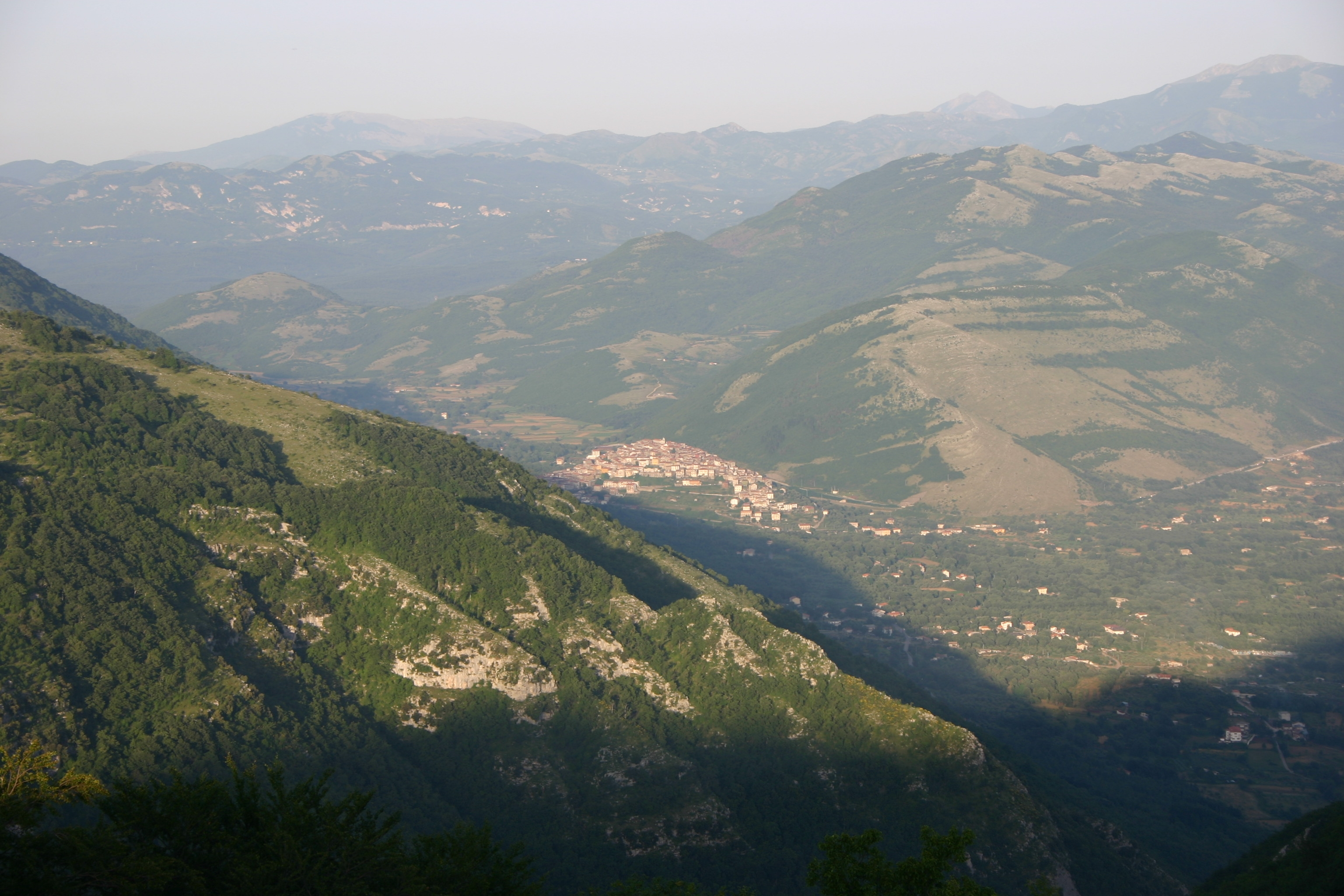 Dorf Sanza vom Colle del Pero.